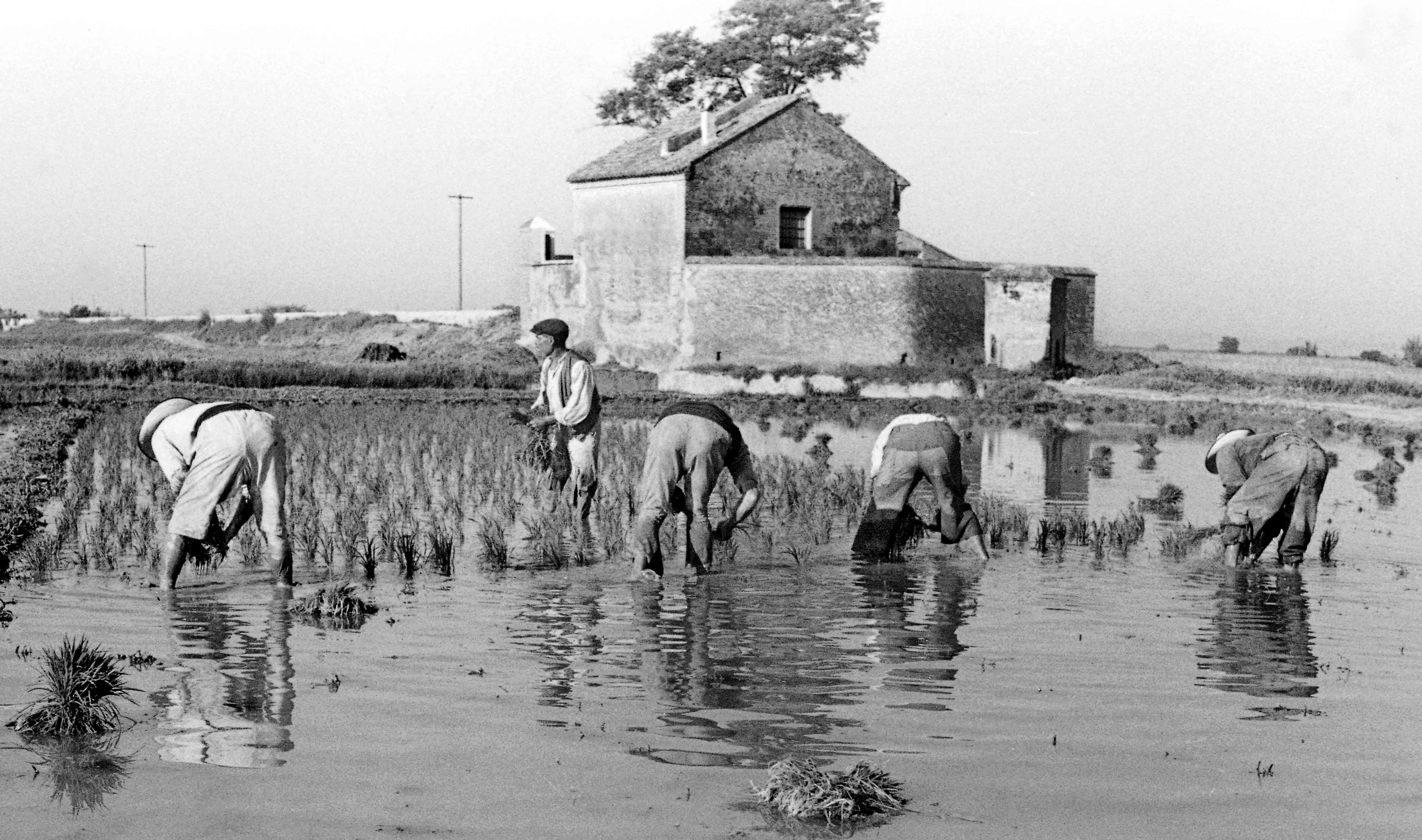 Projecte de col·laboració de l'Arxiu Ismael Latorre Mendoza amb Wikimedia Commons i Amical Wikimedia. L'Arxiu allibera avui aquesta imatge feta per Ismael Latorre Mendoza amb data 23-05-1949. S'hi conserven 23 negatius dedicats a l'arròs a la mateixa carpeta i desenes d'imatges a l'arxiu. El Cano d'Alginet (Séquia reial del Xúquer) és una instal·lació hidràulica que serveix per travessar el barranc dels Algadins, amb dues rampes d'entrada i sortida; i un tram recte. La longitud és de 170 metres i la capacitat per a 10 metres cúbics per segon. Amplada i alçada de 3 i 1'80 metres, respectivament. Actualment aquesta instal·lació hidràulica està al costat de la nova línia d'AVE, pròxima a l'Autovia de la Mediterrània o A-7. Des d'aquesta autovia fins els camps actuals d'arròs la distància, en direcció a la mar, supera els 4 quilòmetres. De fet, en el camí Trullàs, la Moncarra i el terme d'Alginet, l'arròs ha desaparegut i actualment la terra es dedica a la producció de fruita. Aquesta fotografia es va publicar en: Alginet Butlletí Informatiu, Any 15, núm 48; Agost 1989. Edita Ajuntament d'Alginet; direcció: J. Luis Vera. Dipòsit Legal V. 3087-76. Grup de treball PLÈIADES de l'IES D'Alginet: Ventall d'imatges. Alginet al voltant de 1950 ISBN 84-688-5221-X, pàgina 46. Comes, Salvador: Alginet, arròs i població, 1a edició 2003, ISBN 84-688-1557-8, Alginet, pàgina 178, edita: Salvador Comes. Falta citar l'autoria d'Ismael Latorre en algunes fotos. Segona edició d'aquest llibre sense contracte amb l'Arxiu i amb imatges sense citar l'autoria. També apareix aquesta fotografia a la portada i a les pàgines 21 i 22 del llibre de falles: Falla Poble Nou, Alginet 2010. Tractament de la imatge: Carolina Latorre Canet.